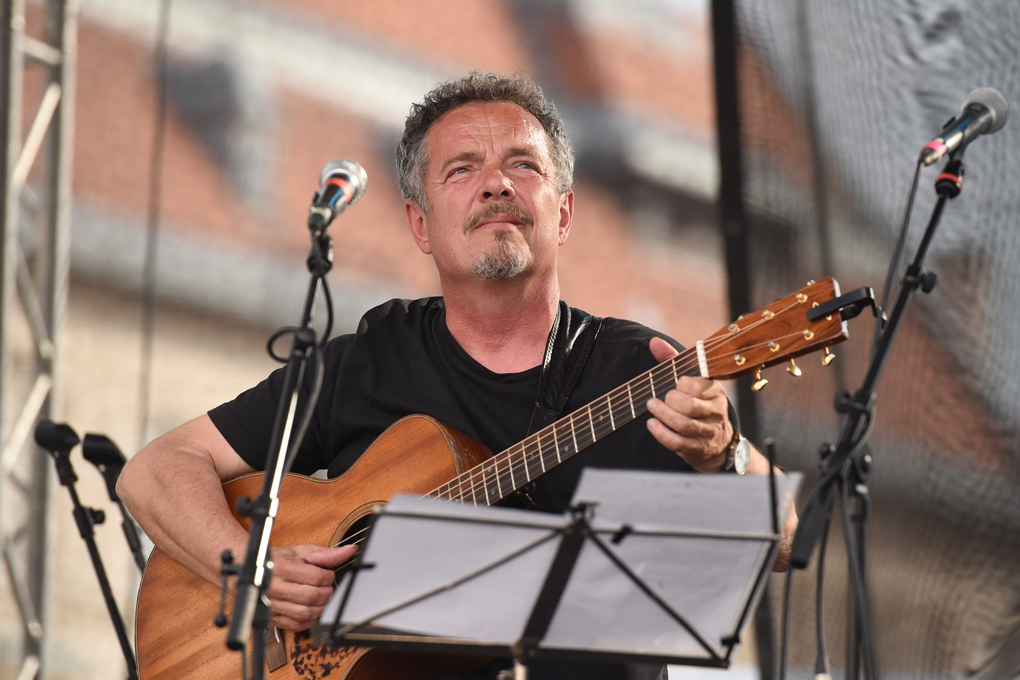 Neřež, 2017